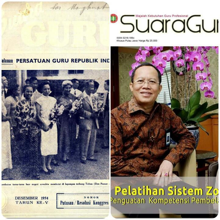 cover majalah suara guru edisi tahun 1950-an dan edisi tahun 2019